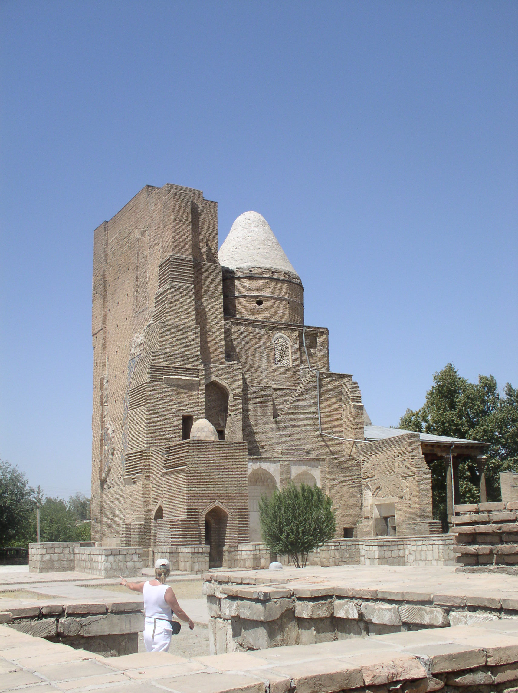 Dorussiadat mausoleum in Shahrisabz, Uzbekistan